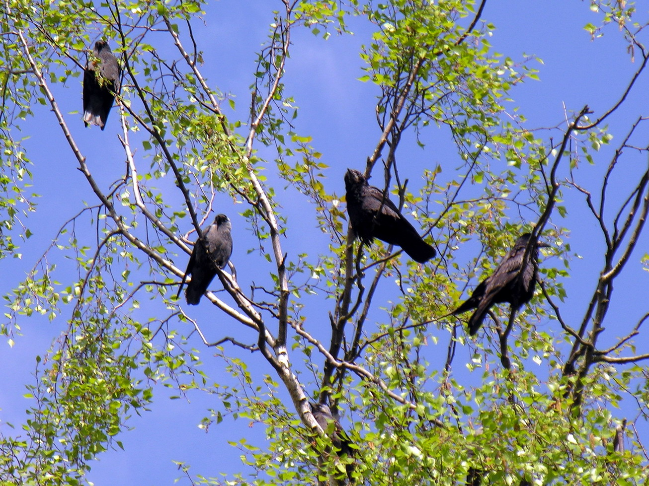 Varniniai paukščiai (Corvidae): 3 Corvus frugilegus, 1 Corvus monedula, kairėje dvi kuosos, dešinėje - du kovai. Fotografavo: Algirdas, 2006 m. gegužės 10 d., Lietuva